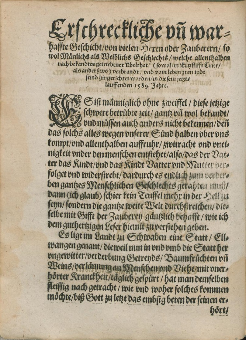 Nikolaus Schreiber: Warhafftige Vnd erschreckliche Beschreibung/ von vielen Zauberern Oder Hexen/ wie vnd warumb man sie hin vnd wider/ verbrandt/ in diesem 1589. Jahre, Köln, 1589. Universitäts- und Landesbibliothek Sachsen-Anhalt, Halle, Saale